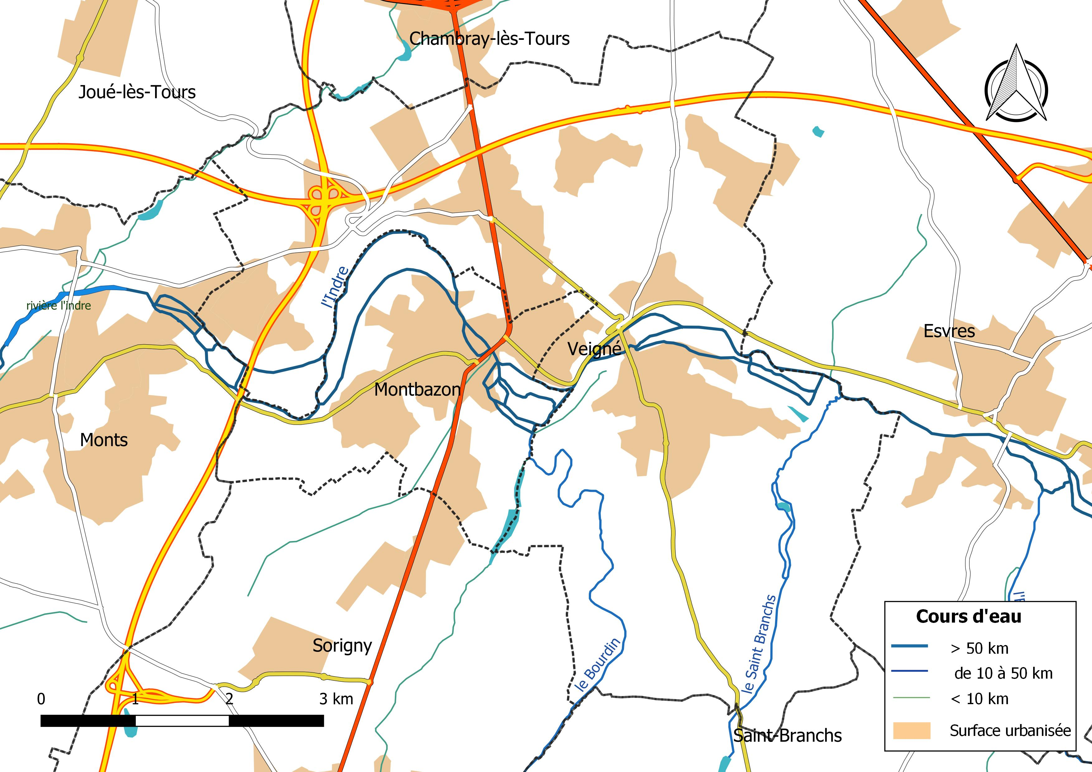 Carte du réseau hydrographique de la commune de Veigné (France).